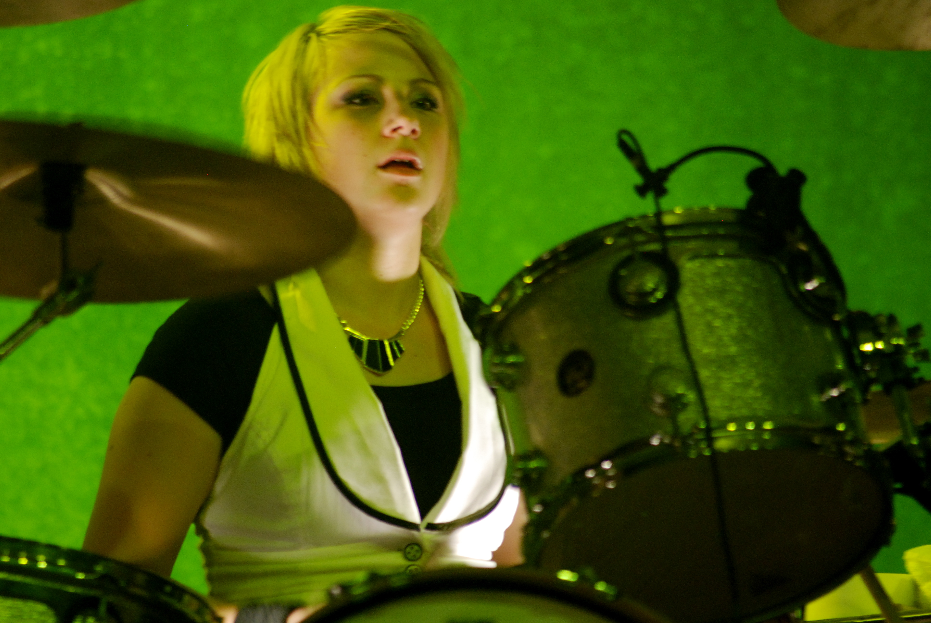 Drummer Jen Ledger of Skillet